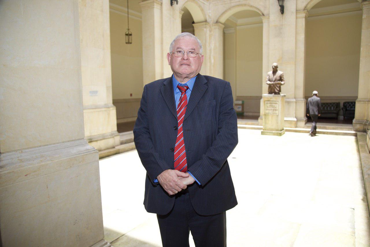 Pablo Cruz, vocero de Voces de Paz y Reconciliación